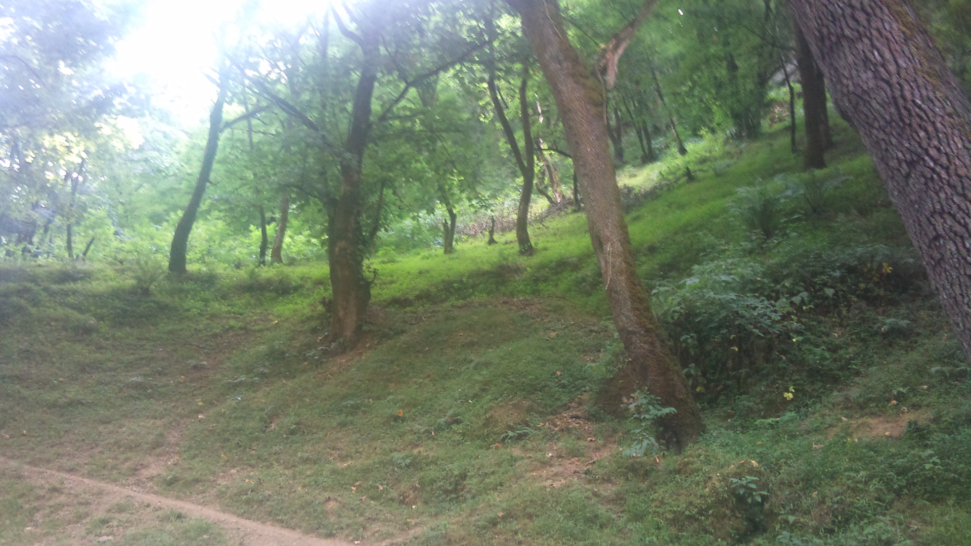 جنگل گیلان